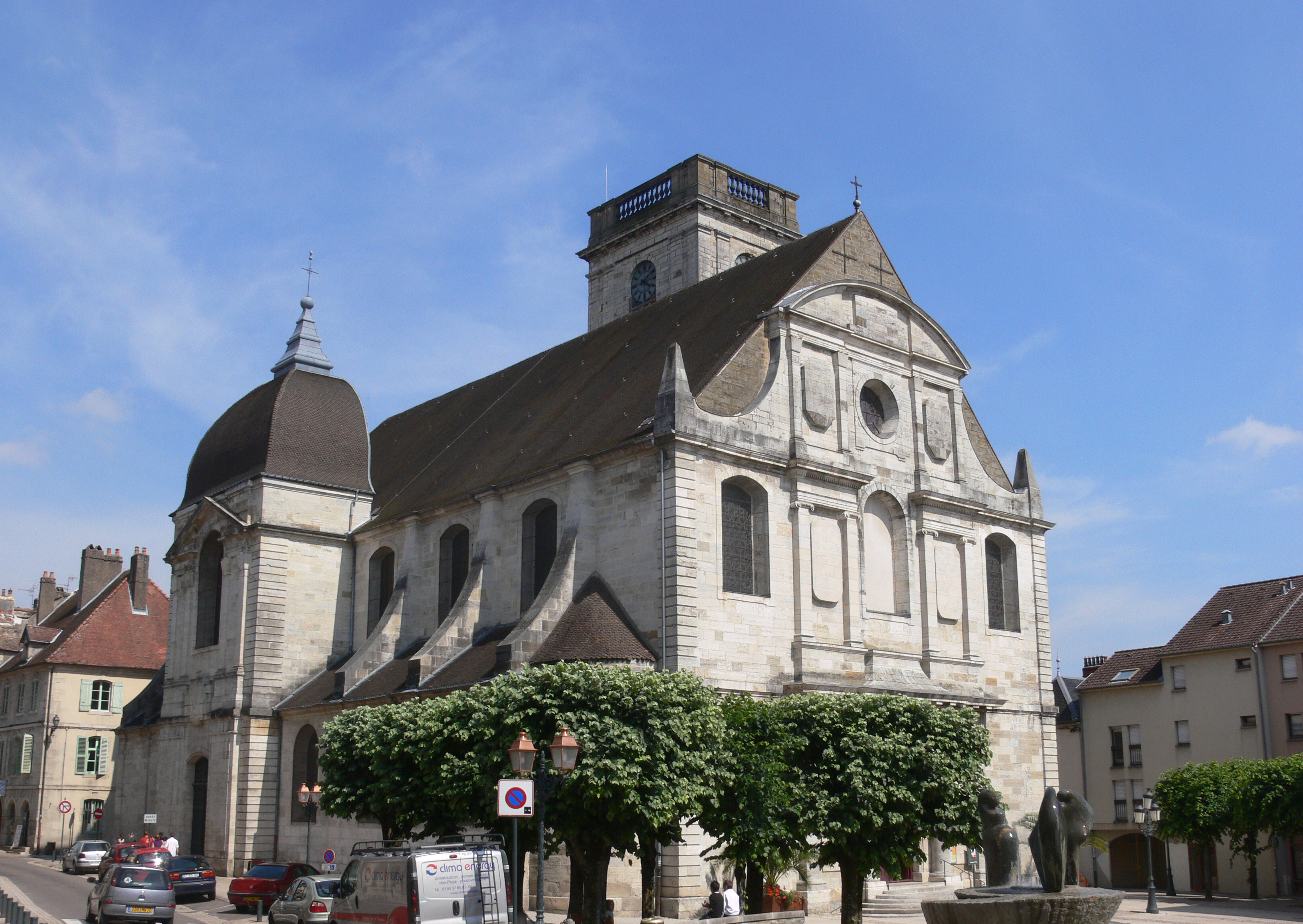 Eglise Saint-Georges, à Vesoul (Haute-Saône). Vue générale depuis le croisement de la rue Salengro et de la rue des Ursulines